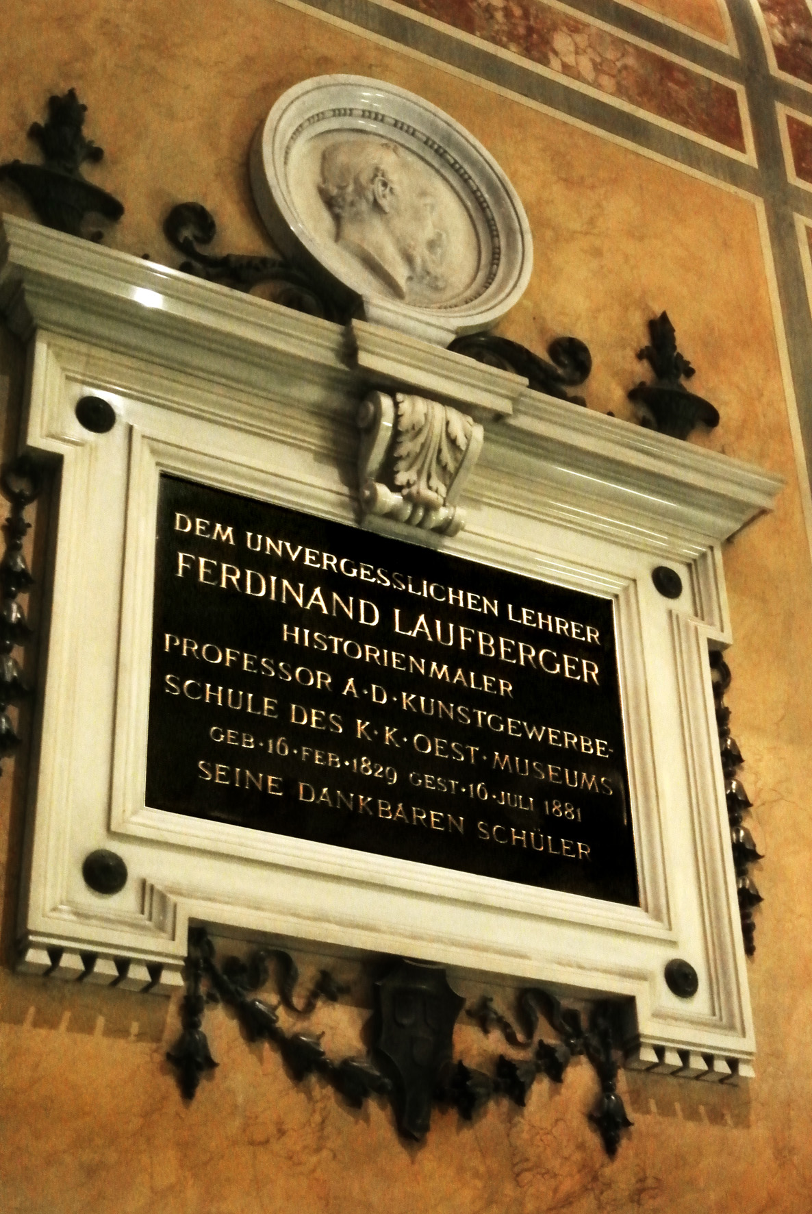 Laufberger Ferdinand Julius Wilhelm, * 16. Februar 1829, † 16. Juli 1881 Wien. Maler, Graphiker, Professor an der Kunstgewerbeschule des Österreichischen Museums für Kunst und Industrie (ernannt am 29. Juni 1868). Von 1871-1873 und 1878-1881 Direktor an der selbigen. Lehrer der Brüder Ernst und Gustav Klimt sowie Franz von Matsch. Von ihm stammt die malerische Ausschmückung des Treppenhauses in dem von Heinrich v. Ferstel erbauten österreichischen Museum für angewandte Kunst (MAK). GT Inschrift: DEM UNVERGESSLICHEN LEHRER FERDINAND LAUFBERGER HISTORIENMALER PROFESSOR A.D.KUNSTGEWERBESCHULE DES K.K.OEST.MUSEUMS GEB.16.FEB.1829 GEST.16.JULI 1881 SEINE DANKBAREN SCHÜLER